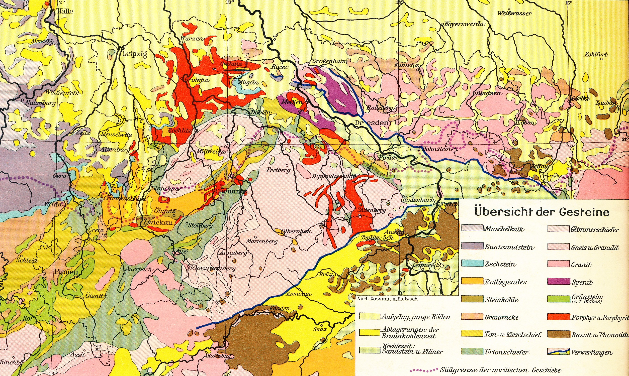 Freistaat Sachsen, Übersicht der Gesteine This is a part of an old atlas. It does not represent the current situation.